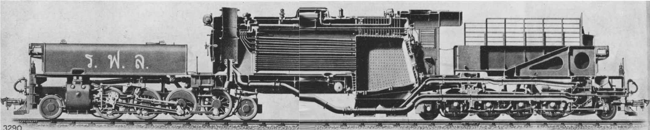 Garratt-Lokomotive von Henschel & Sohn für Siam